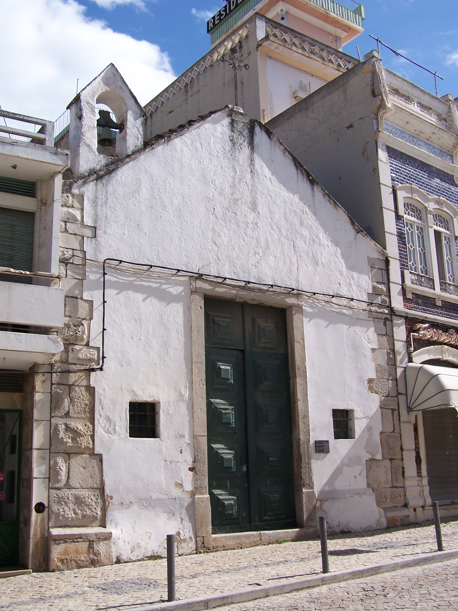 Capela de Nossa Senhora da Consolação de Tavira.